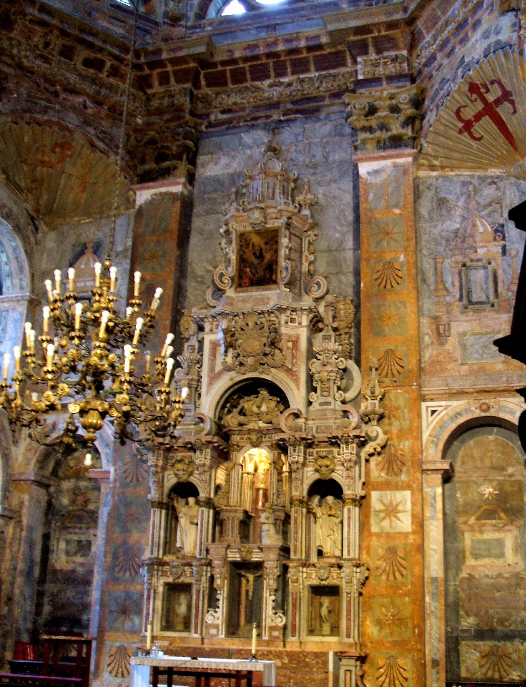 Capilla de la Virgen del Pilar de la catedral de Santiago de Compostela.